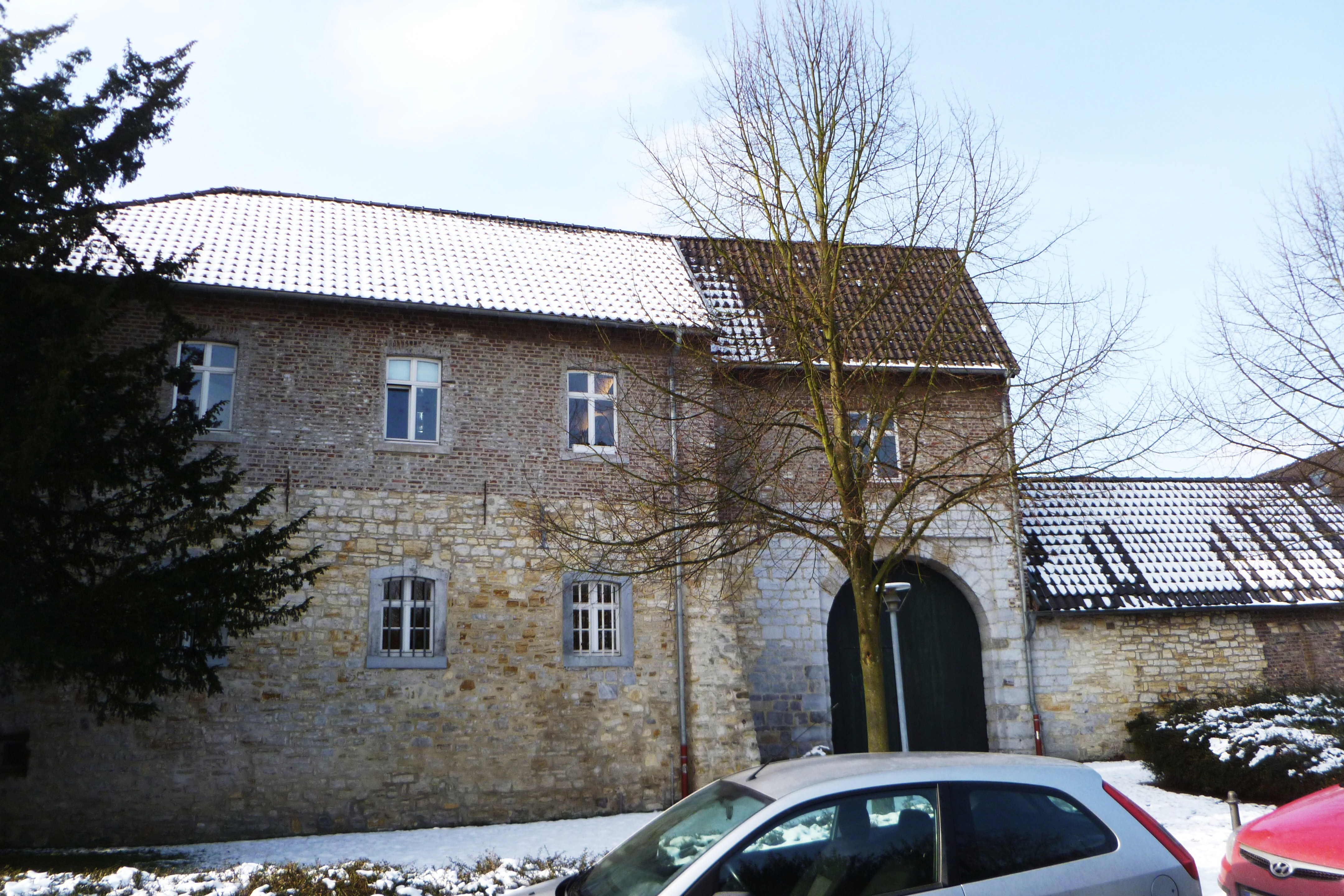 Baudenkmal in Aachen-Laurensberg